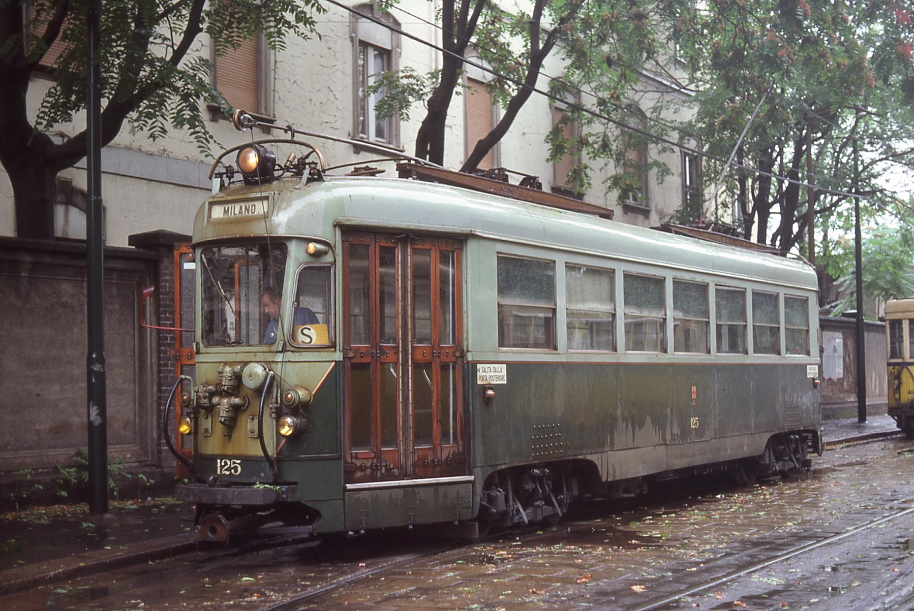 Vettura tranviaria interurbana n. 125 dell'ATM di Milano, in sosta al capolinea di via Valtellina